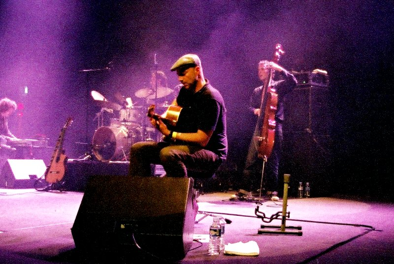 Nouvelle Vague @ Le Cargö - Caen